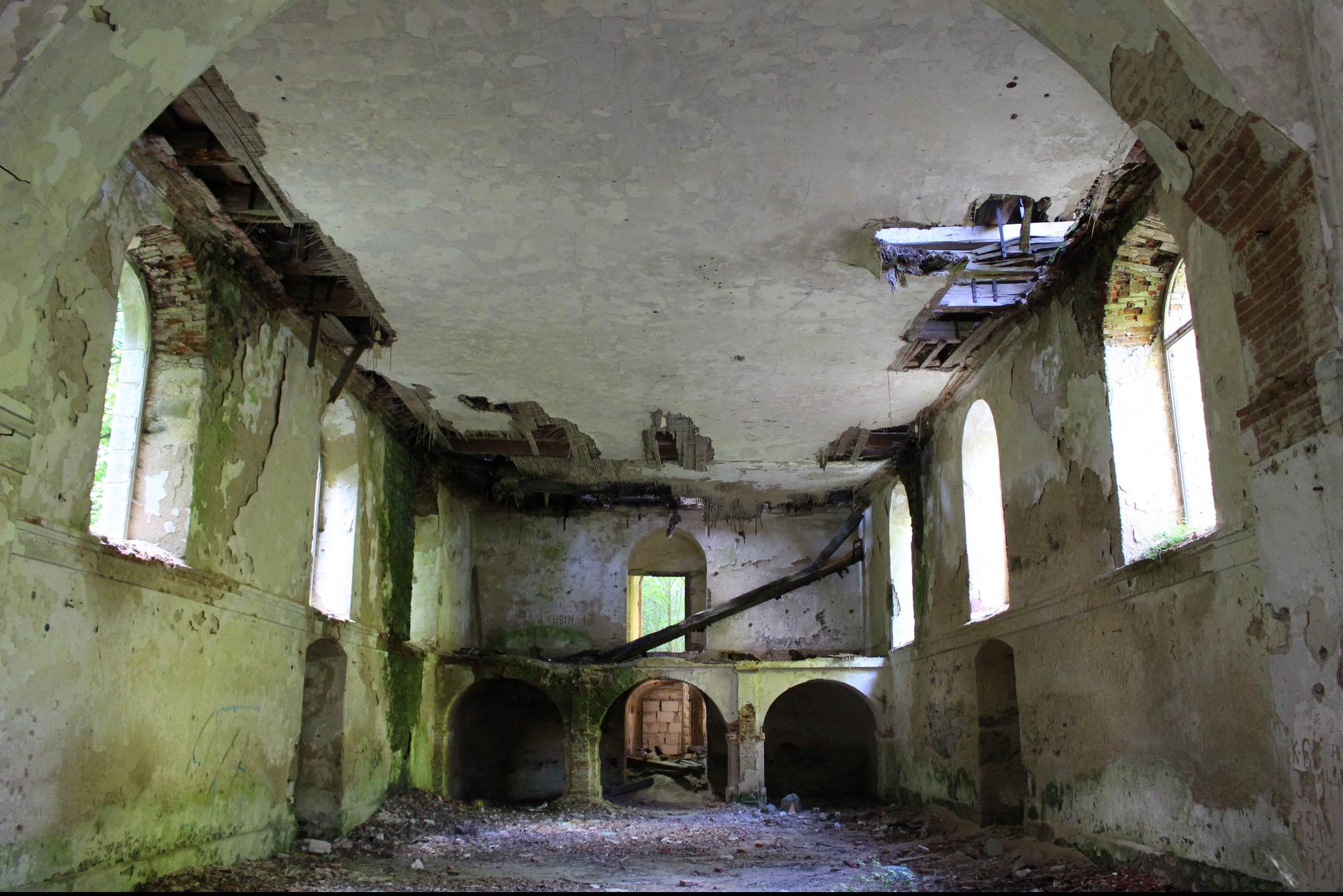 Nové Domky, část obce Rozvadov, okres Tachov, Plzeňský kraj, "interiér" kostela Navštívení Panny Marie